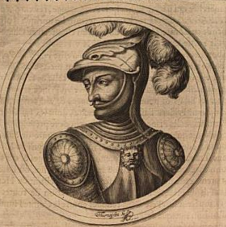 Tomáš I. Savojský